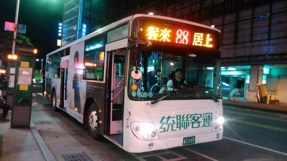 統聯客運低底盤公車411-FP行駛高雄市公車建國幹線。